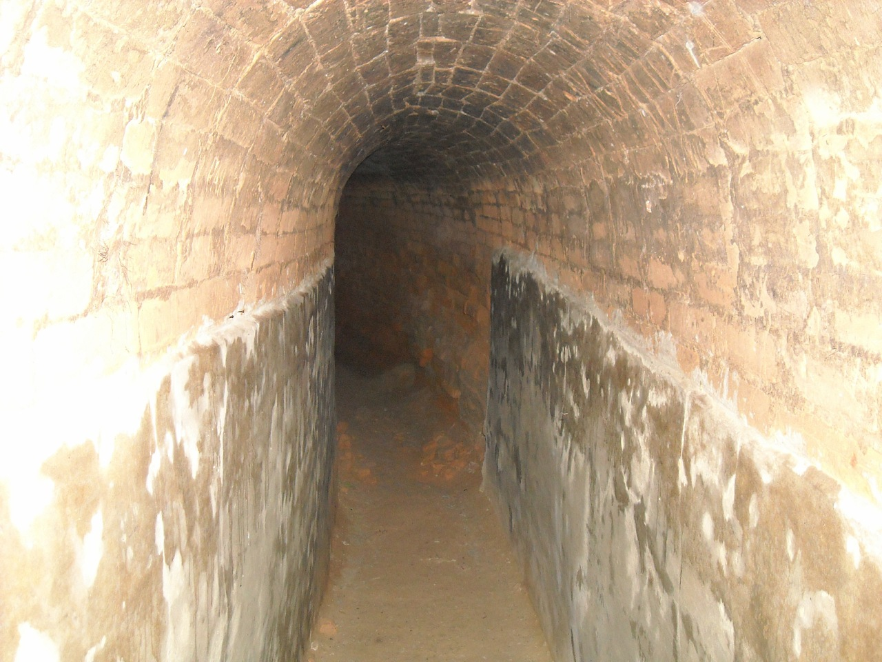 Україна. Харківська область. Краснокутський район. Печери Краснокутського монастирю. 2010 рік.